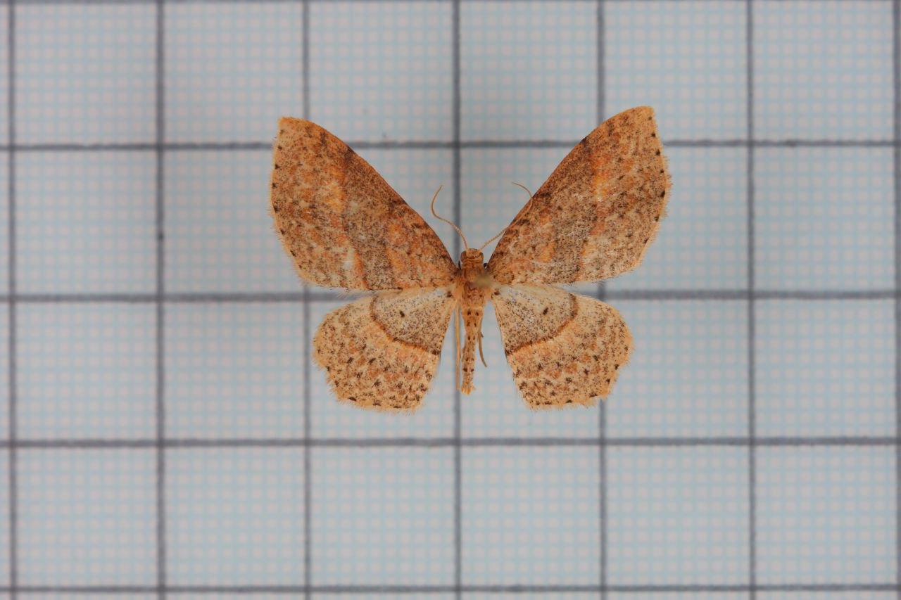 Hydrelia arizana (Wileman) 阿里山水尺蛾 鞍1:P.47,Pl.12-11 台灣蛾類圖說3:P.286